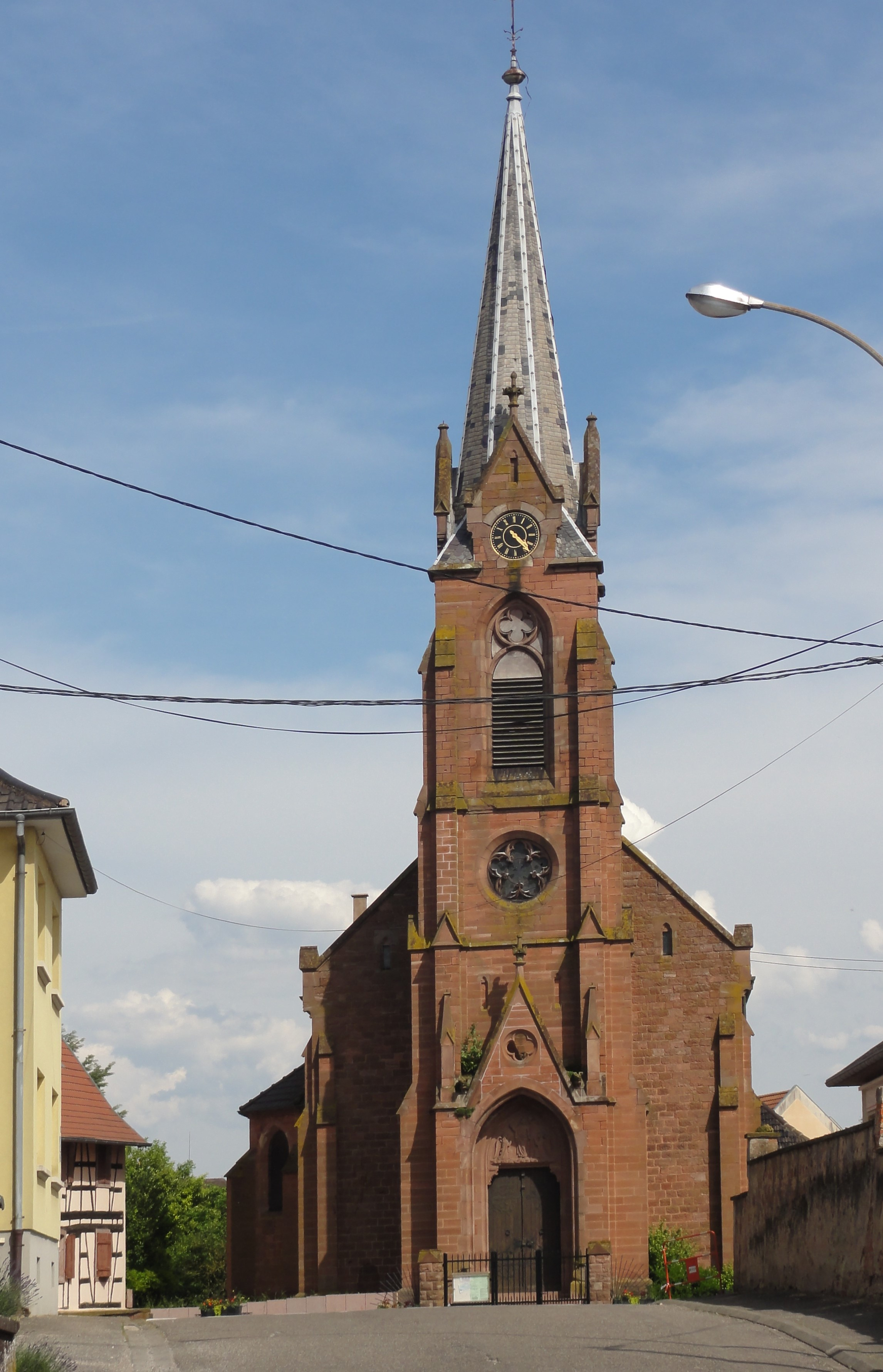 Alsace, Bas-Rhin, Geudertheim, Église catholique Saint-Blaise (XIXe)